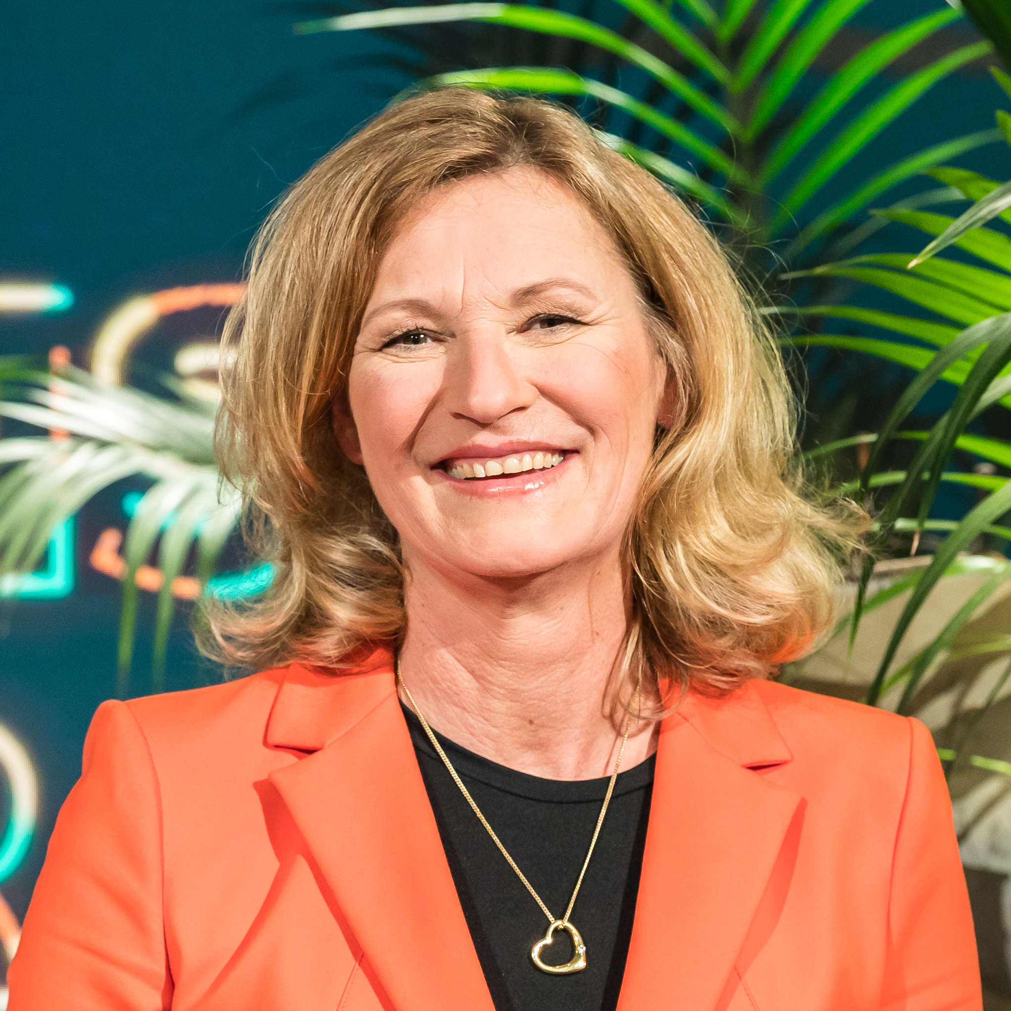 „Geheimniskrämer“ mit Martin Klempnow und seinen Gästen. Aufzeichnung des Westdeutschen Rundfunks im Studio Köln-Bocklemünd vom 23. Januar 2018 Foto: Heike Henkel